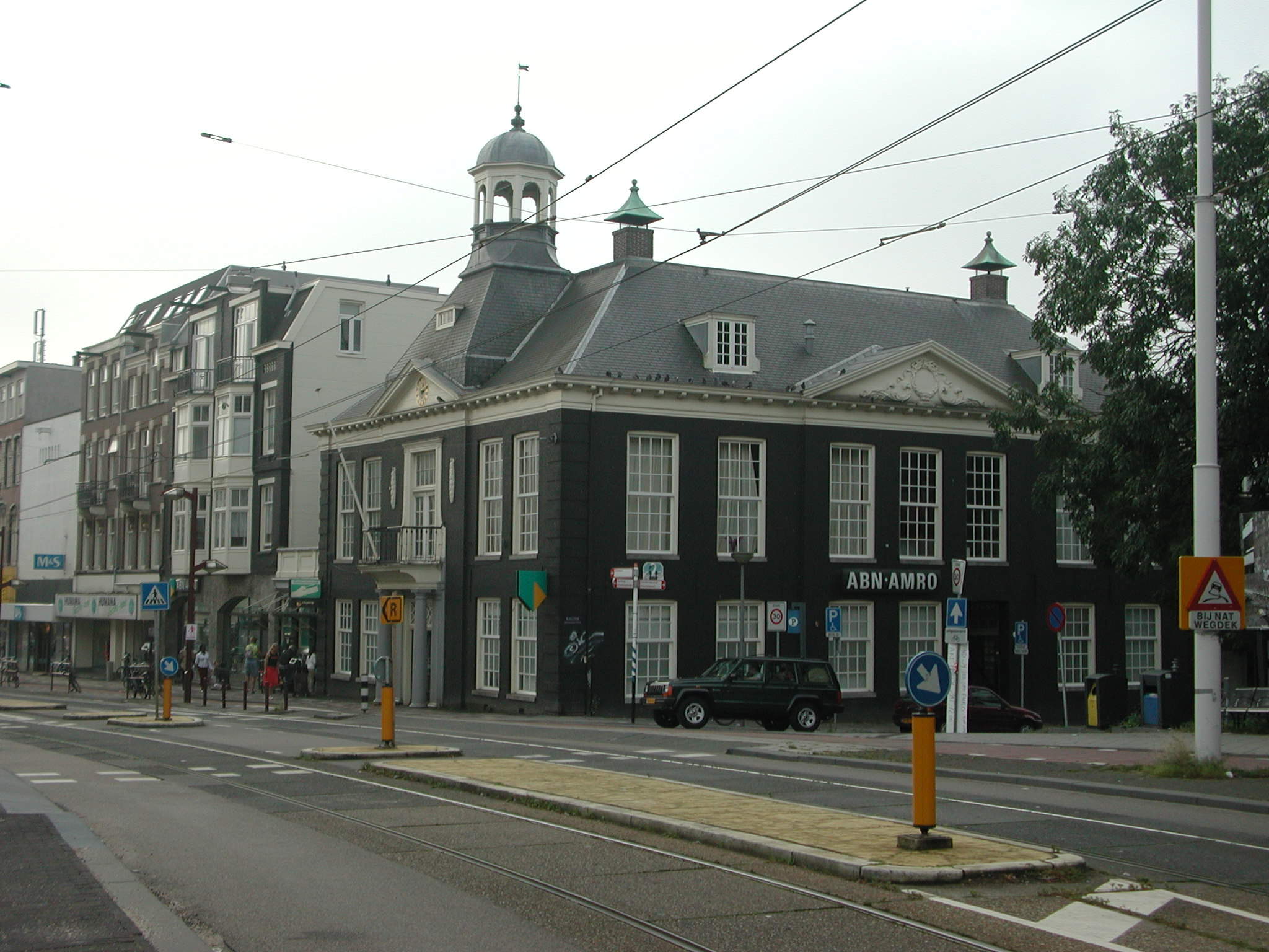 Het rechtshuis, Watergraafsmeer, Amsterdam; Oetewalerbrug op de voorgrond